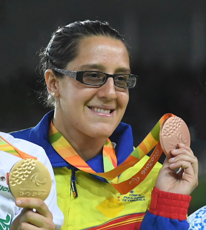 Rio de Janeiro - A brasileira Alana Martins Maldonado recebe medalha de prata no judô categoria até 70 kg na Paralimpíada Rio 2016.